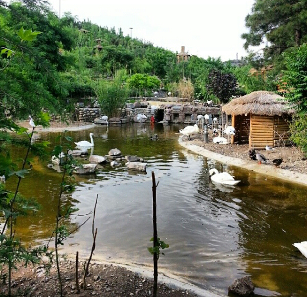 باغ پرندگان001